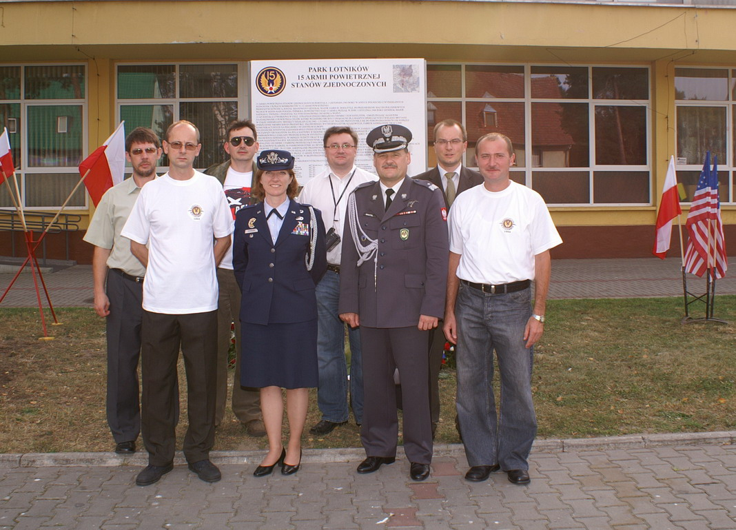 odsłonięcie tablicy upamiętniającej lotników poległych na Ziemi Kozielskiej w 1944 roku